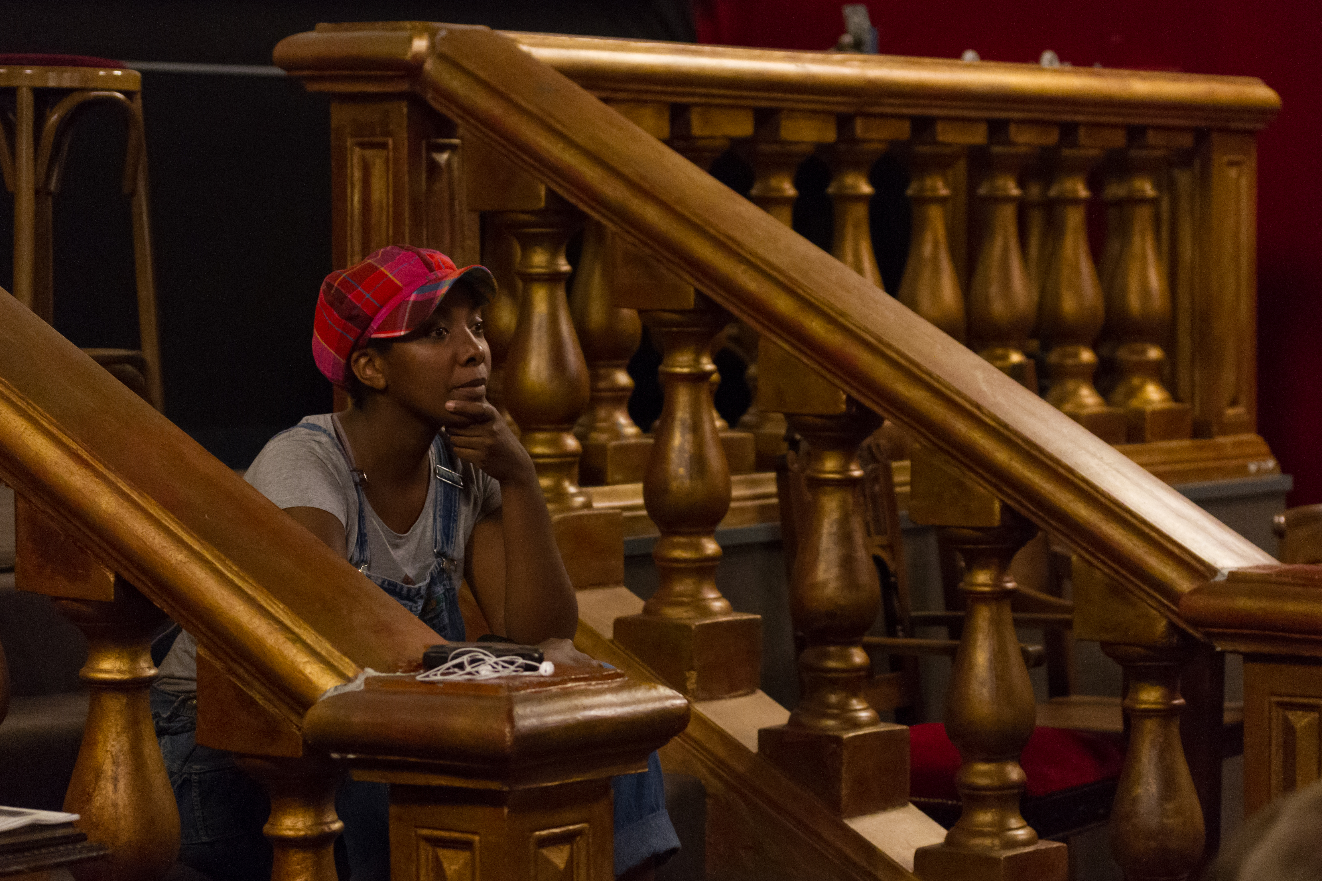 Projection-Débat d'Ouvrir la Voix à l'American Cosmograph